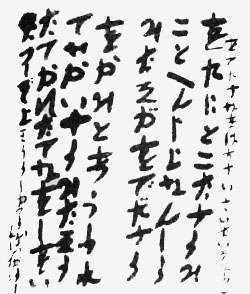 Fragmento do Ofudesaki recebido por Nao Deguchi.